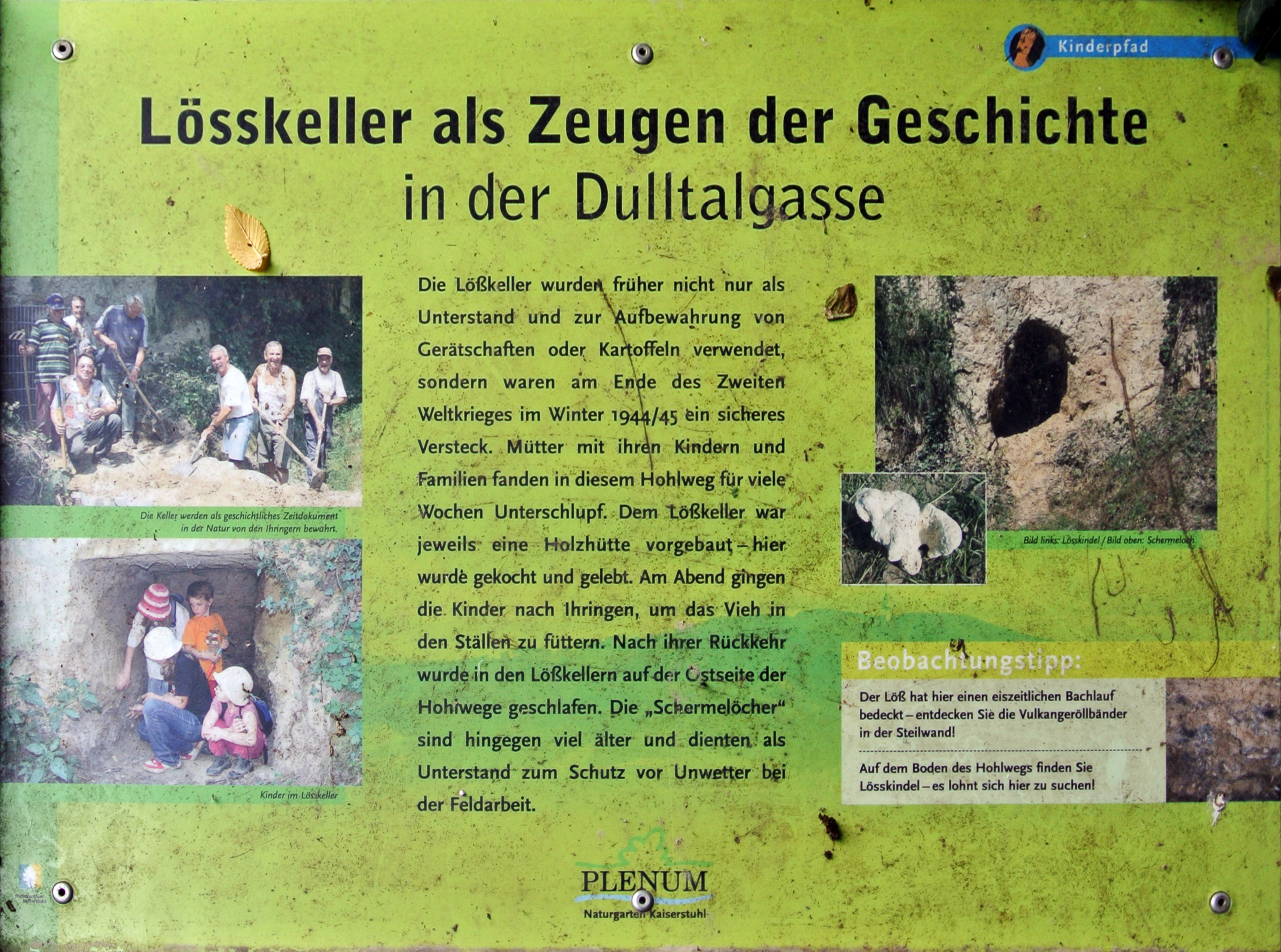 Lösskeller (Ihringen)